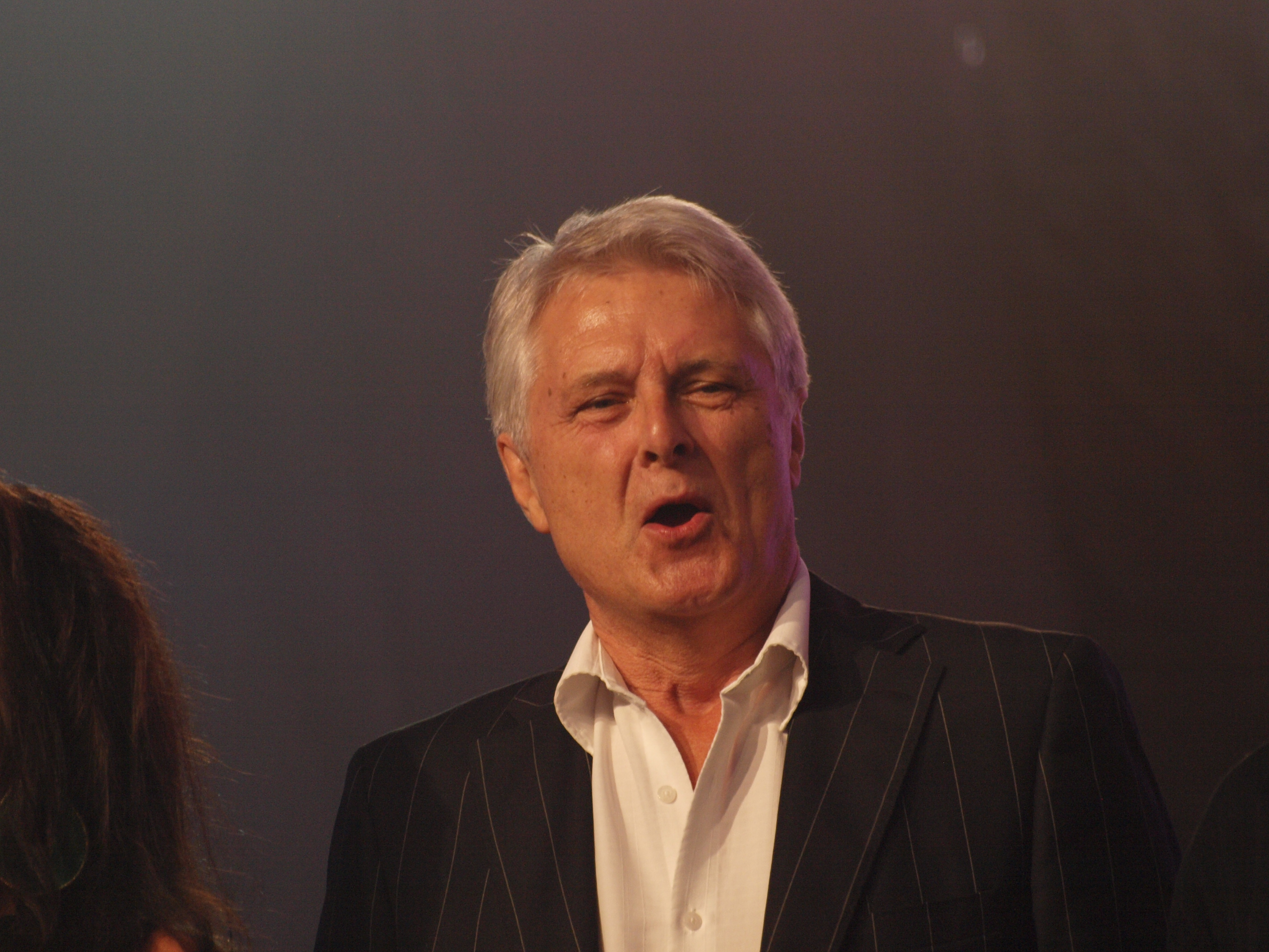 Claes-Göran Hederström at Stockholm Pride 2010.